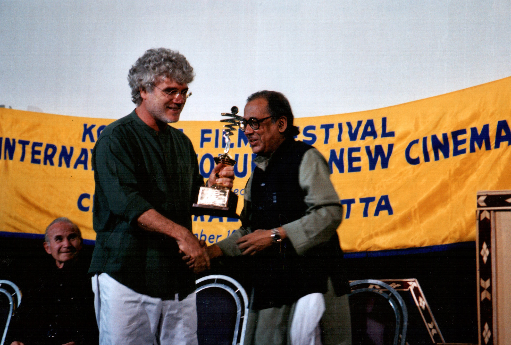 דורון ערן מקבל פרס על קידום הקולנוע הישראלי בעולם, מיו"ר פורום הקולנוע החדש, קלקוטה הודו